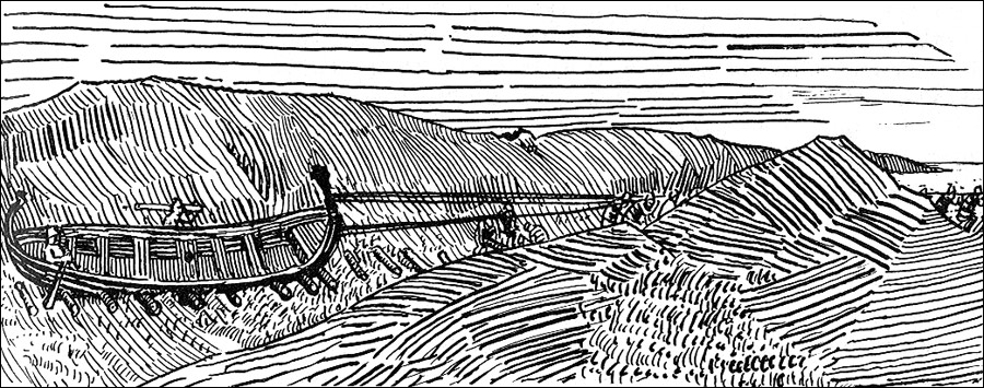 Illustration for Magnus Berrføtts saga, Heimskringla 1899-edition. nn: «Kongen sjølv sette seg i lyftingen og heldt om styrestonga.»